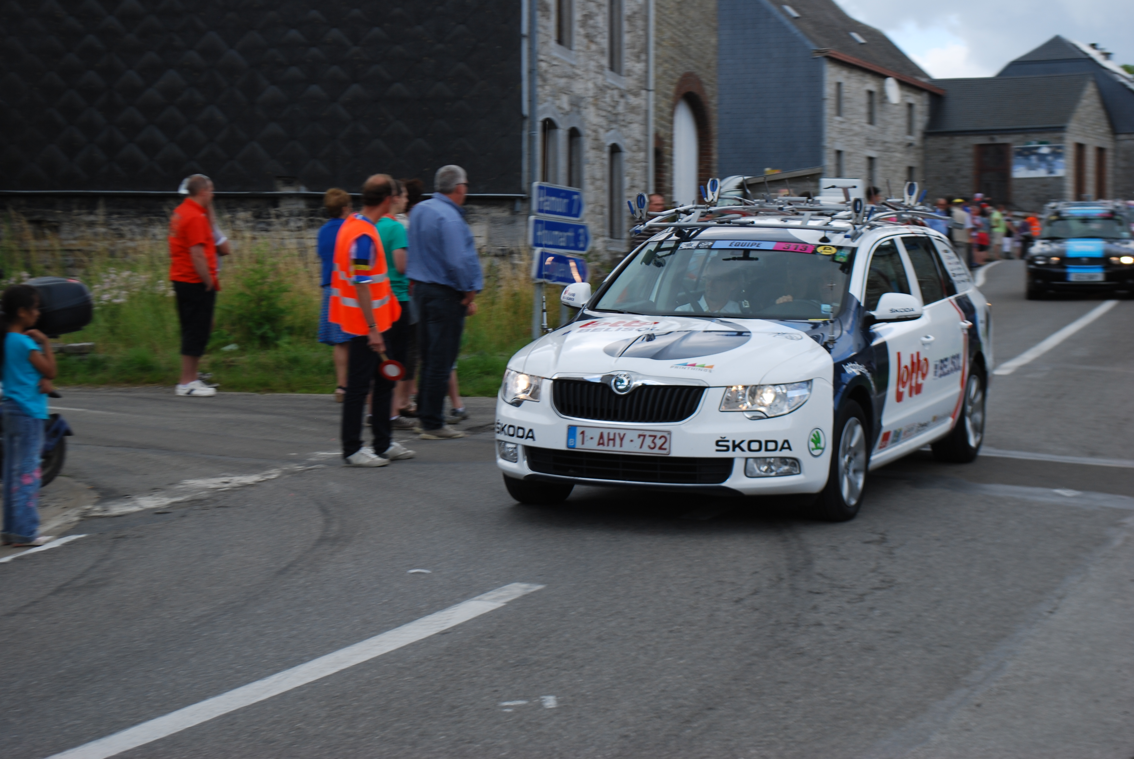 Vue du passage du Tour de France à Tohogne (Durbuy).